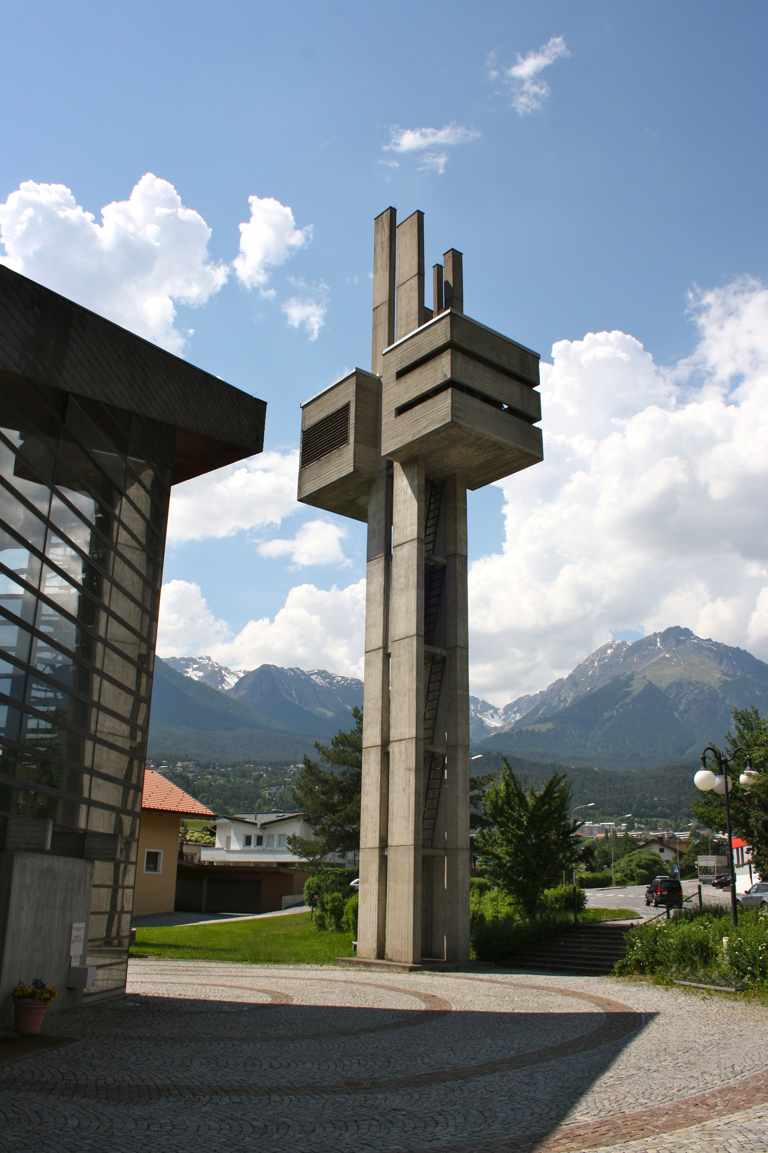 Freistehender Glockenturm der Kirche zu den Heiligen Engeln in Brennbichl, Stadtgemeinde Imst.